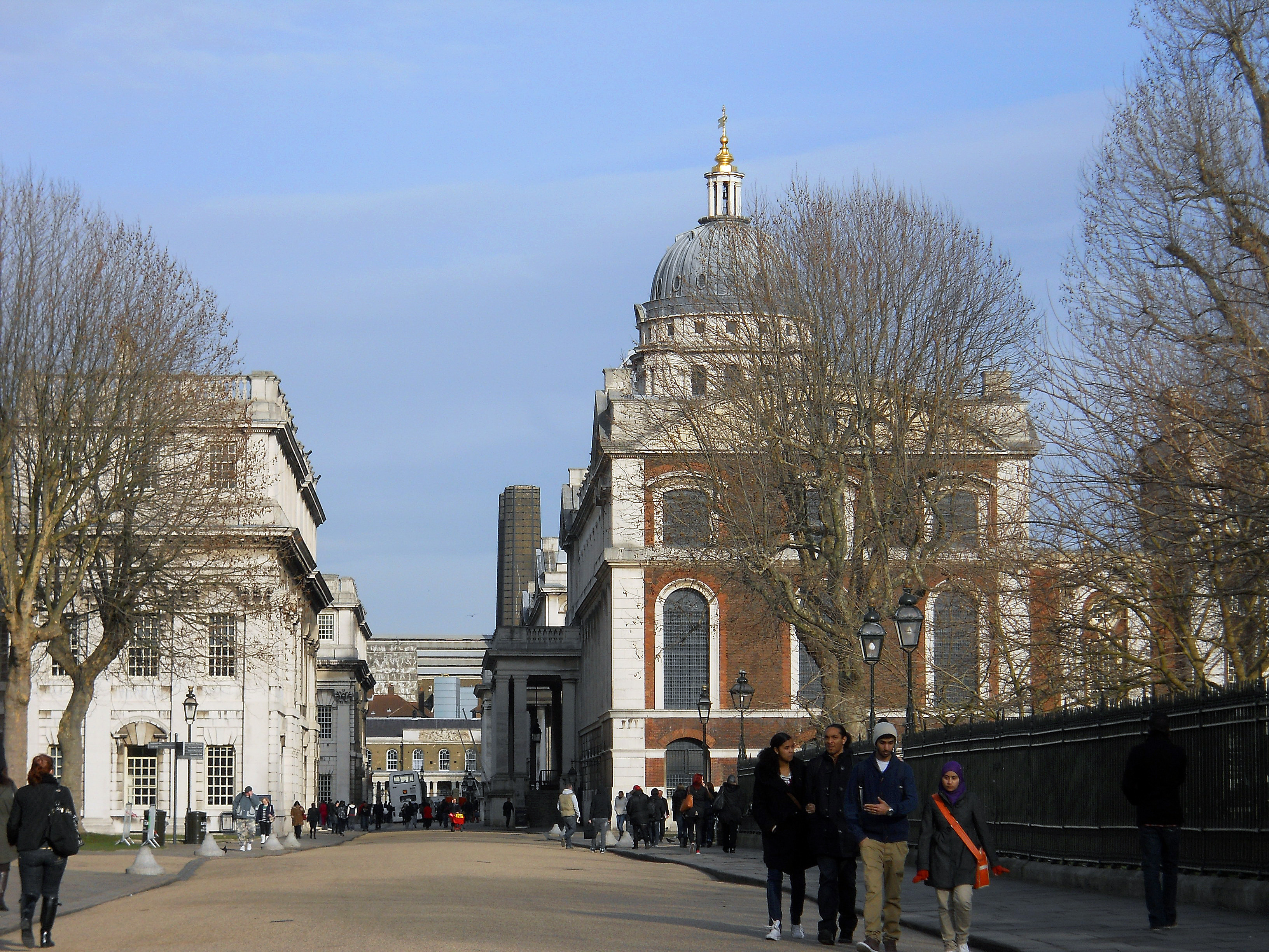 Лондонский университет Гринвич. 2012 г